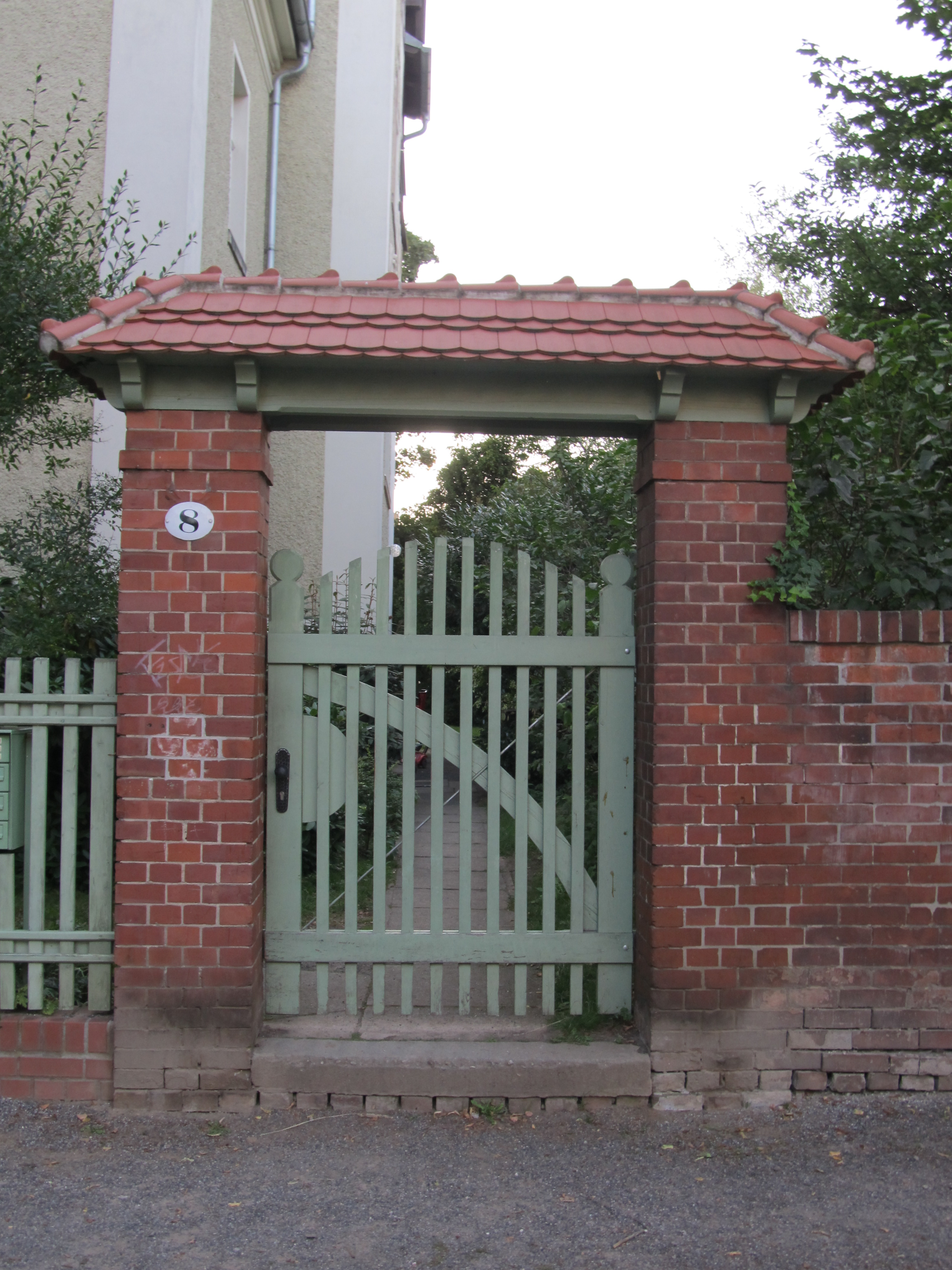 Eingang zum Grundstück der Mietvilla Roseggerstraße 8, Radebeul